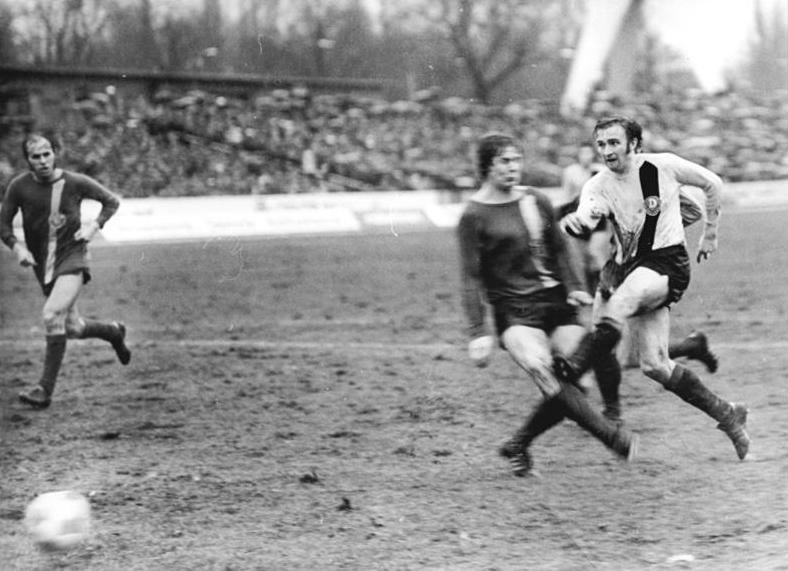 ADN-ZB-Häßler-23-2-74-ma-Dresden: Fußball-Oberliga, Dynamo Dresden - FC Hansa Rostock 2:1 - In der 64. Spielminute erzielt Siegmar Wätzlich (Dynamo Dresden, rechts) das 2:1-Siegestor.